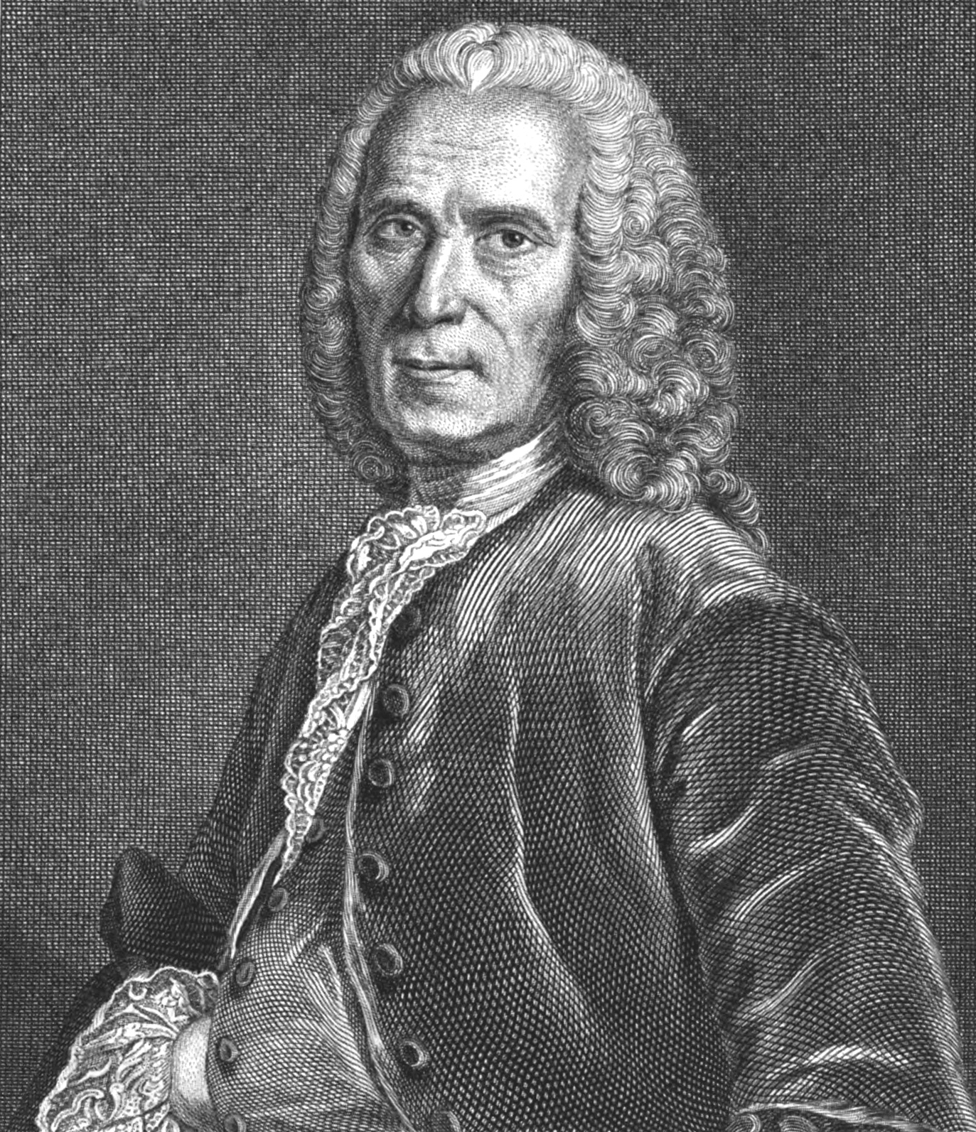 Autorenbild Astruc 1766